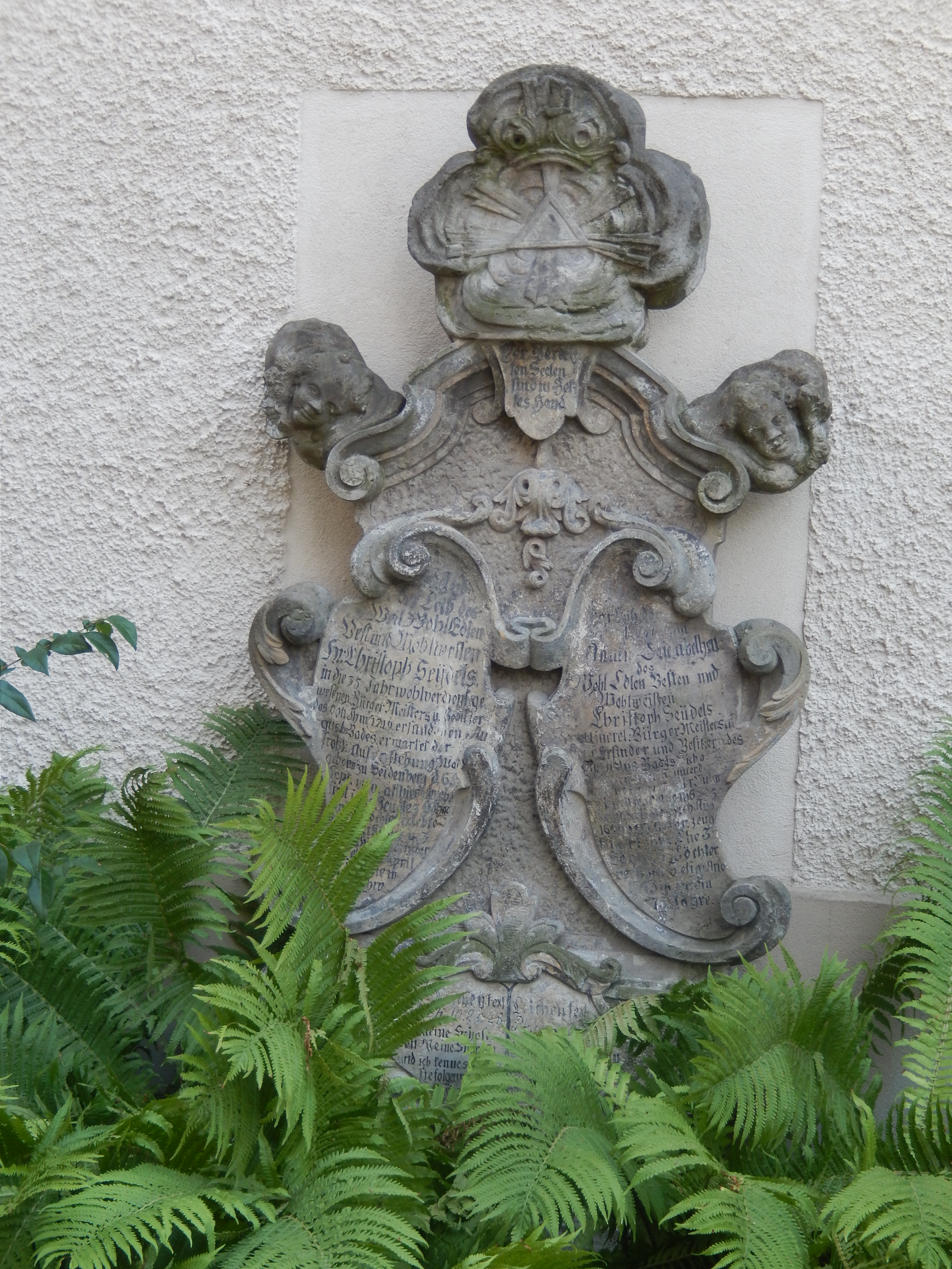 Stadtkirche "Zum Heiligen Namen Gottes" Radeberg, Grabplatte der Familie Christoph Sejidel, war 35 Jahre der Bürgermeister der Stadt und hat 1715 die Heilquellen in Liegau-Augustusbad entdeckt.